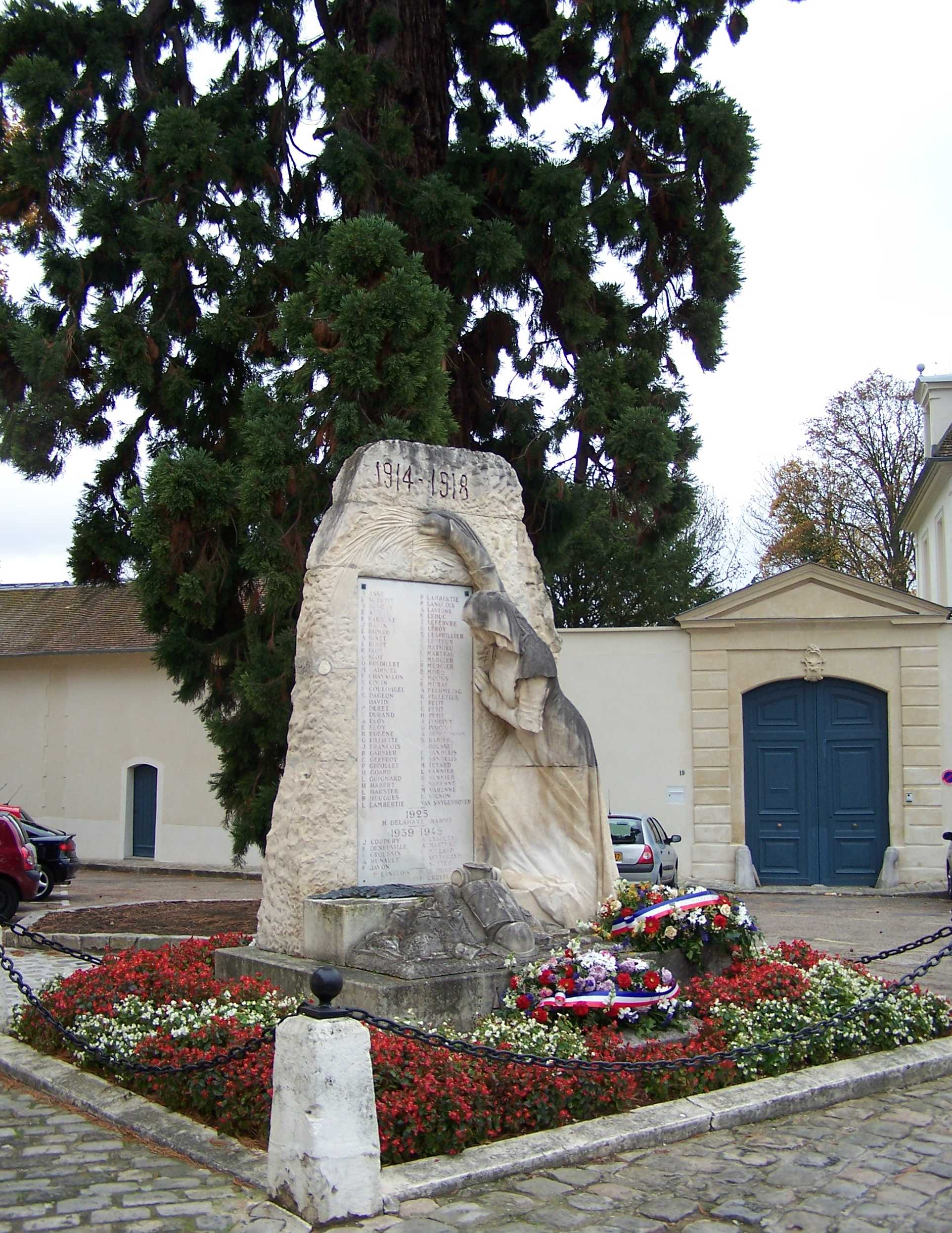 Monument aux morts de Montfort-l'Amaury (Yvelines, France)